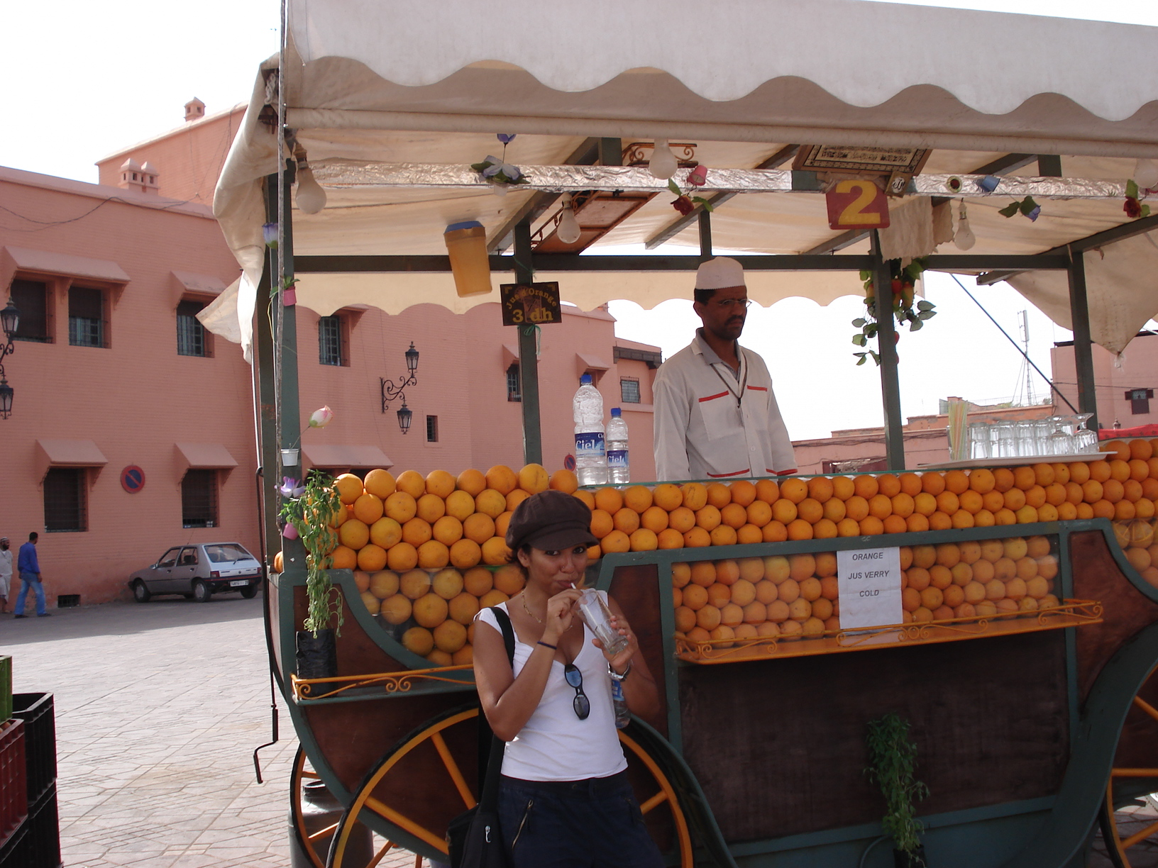 Djama Elfna square Marrakech